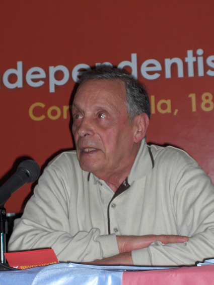 Intervenção de Francisco Martins Rodrigues nas X Jornadas Independentistas Galegas, decorridas em Compostela.